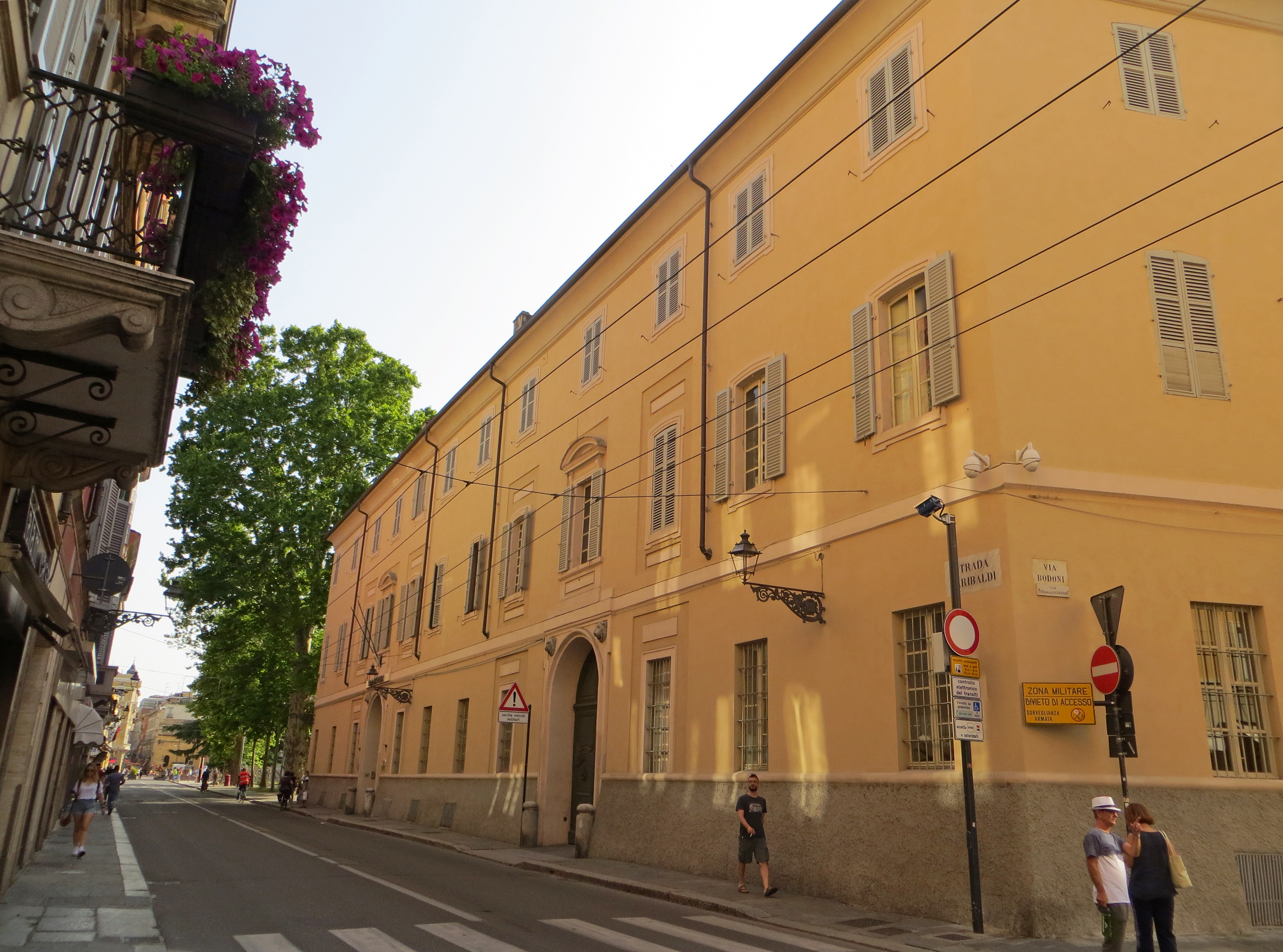 Palazzo dell'Intendenza di Finanza (Parma) - facciata